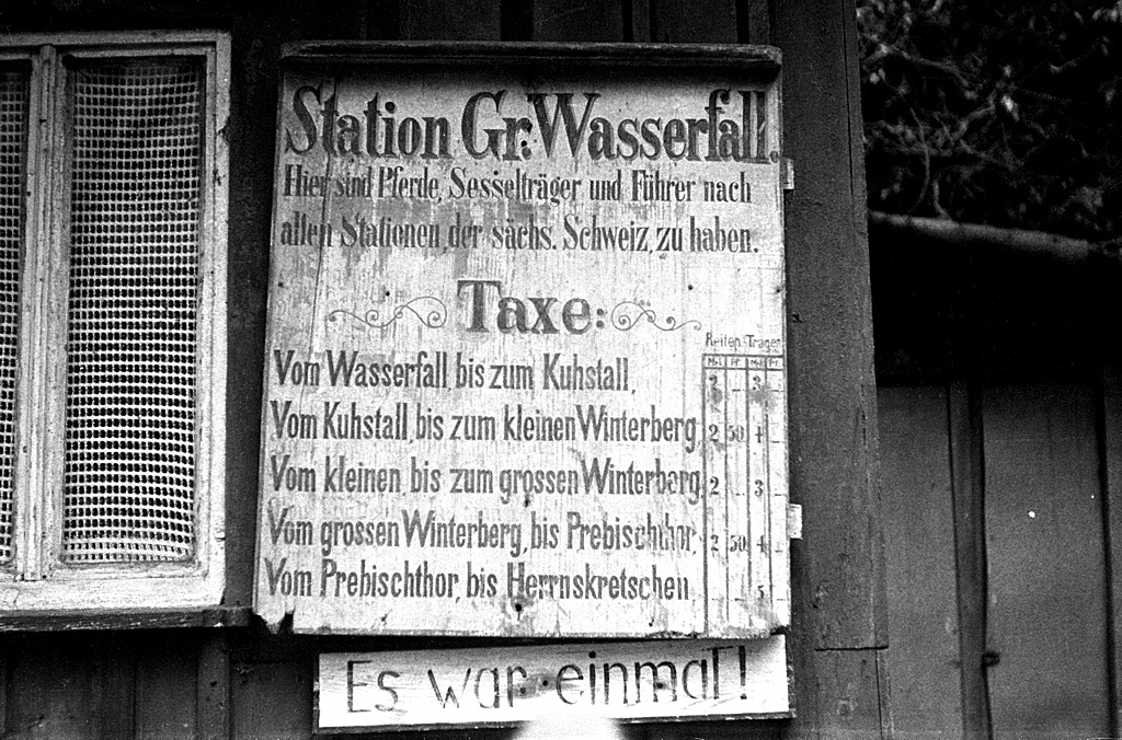 Preistafel am Lichtenhainer Wasserfall (Sächsische Schweiz)